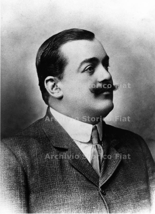 Ritratto di Vincenzo Lancia, fondatore della casa automobilistica Lancia, anni Dieci (Archivio e centro storico Fiat, Archivio iconografico, Lancia, Foto Piloti, Corse, 30)